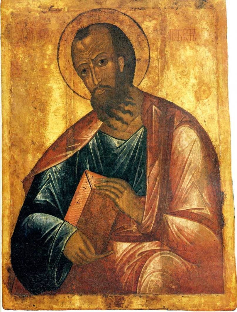 Икона св. апостола Павла из собрания Церковно-археологического кабинета Московской духовной академии